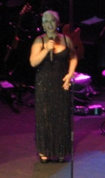 "Kendi çekimimden Sezen Aksu konser resmi, Maltepe Üniversitesi (9 Temmuz 2009)."